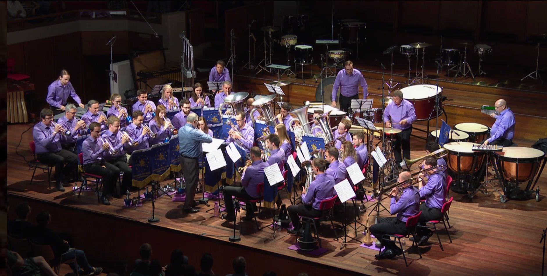 Brass Band Willebroek, Frans Violet, EBBC2018, own choice